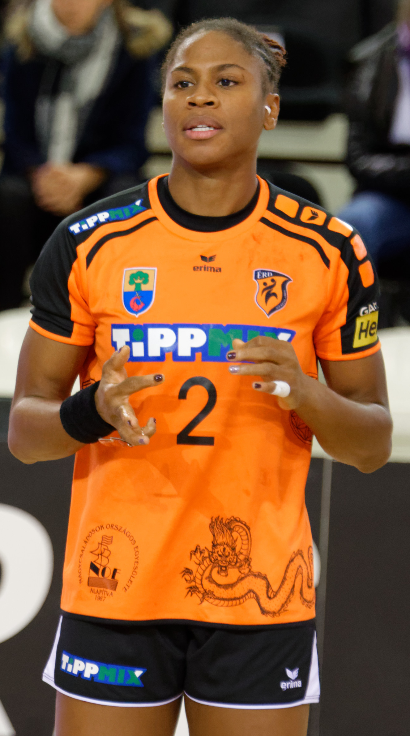 Rencontre retour du 3e tour de la coupe EHF, Issy Paris Hand / Erd. A Issy Les Moulineaux, le 18 novembre 2017.